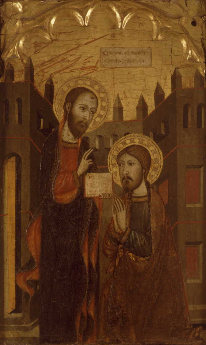 La obra representa al evangelista San Lucas siendo recibido como discípulo por el apóstol San Pablo.